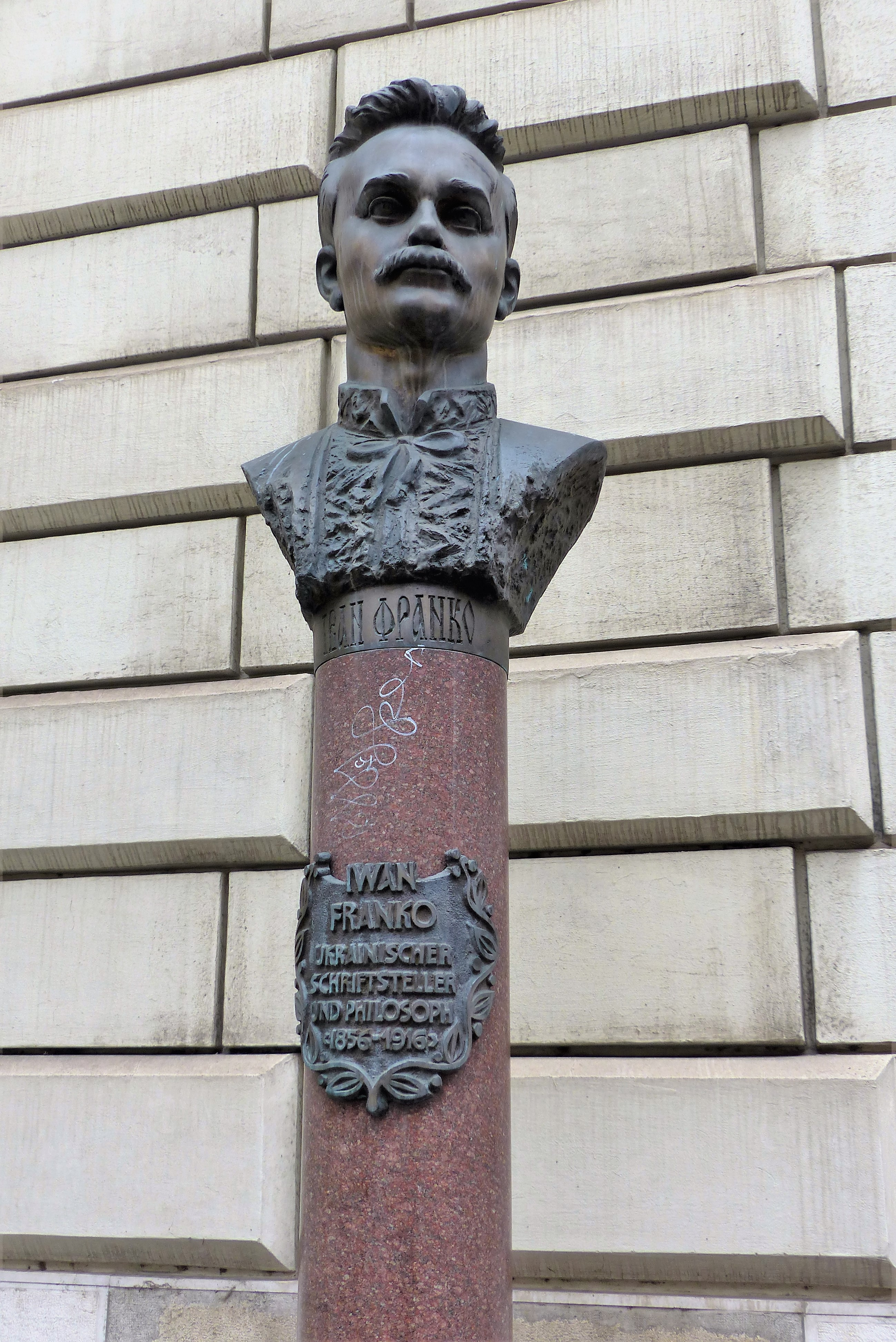 Ivan Franko-Denkmal in Wien, 1, Postgasse bei 8 (